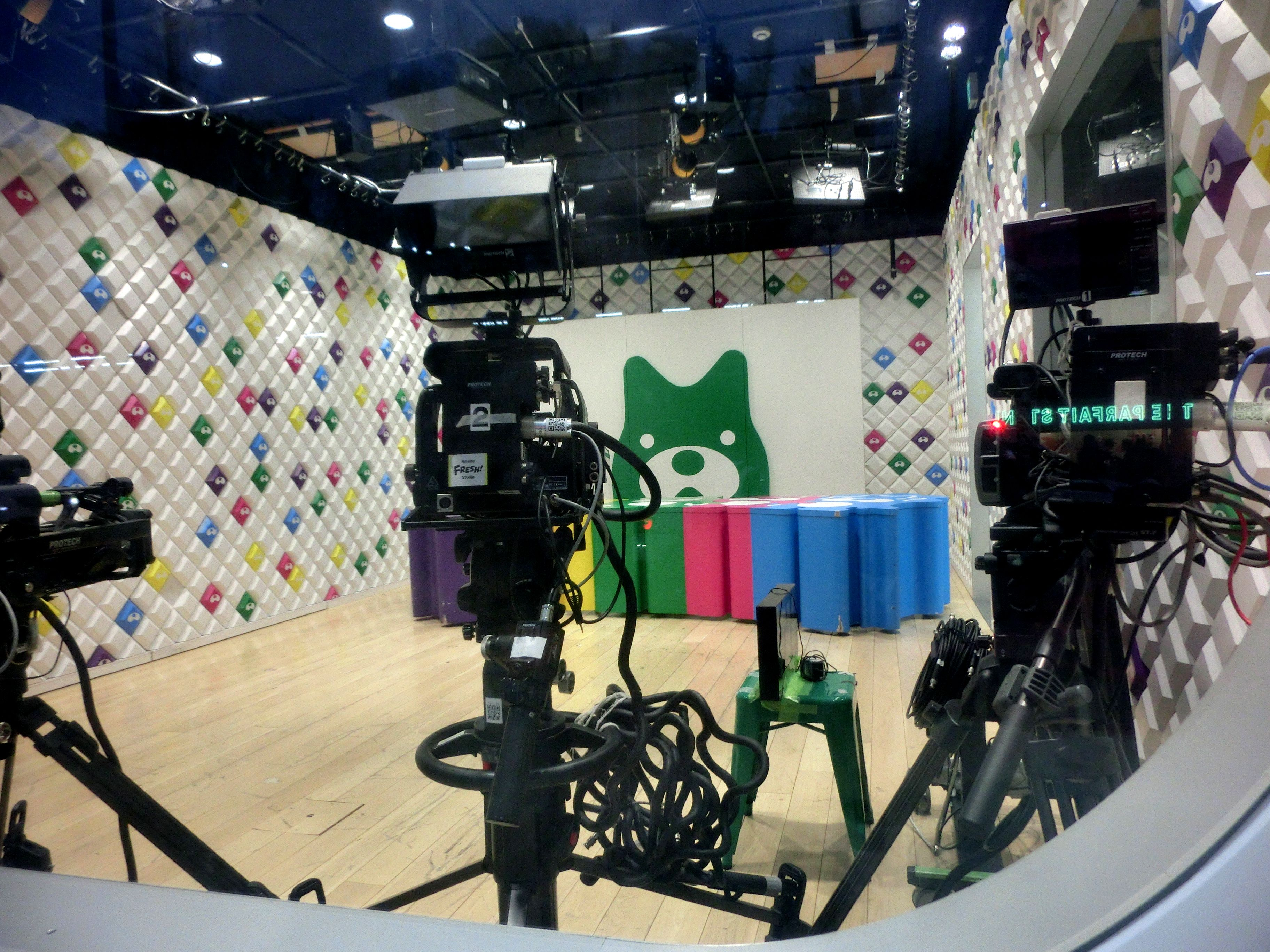 HARAJUKU Abema Studio